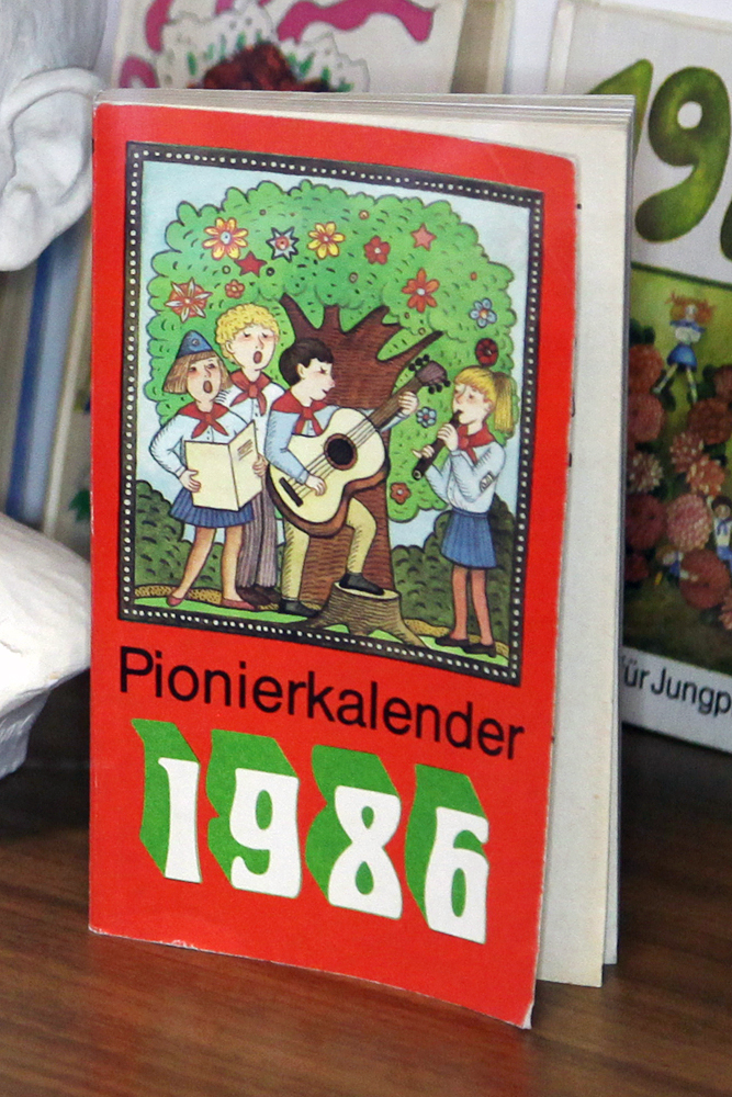 Pionierkalender von 1986 im DDR-Museum Pirna